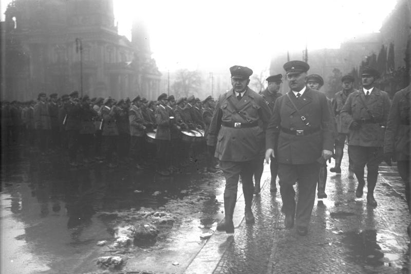 Der grosse Reichsbanneraufmarsch vor ihrem Führer Hörsing im Lustgarten in Berlin! Der Führer des Reichsbanners Hörsing (x) beim Abschreiten der neuen "Schufos" (Schutzformationen des Reichsbanners) im Lustgarten in Berlin.